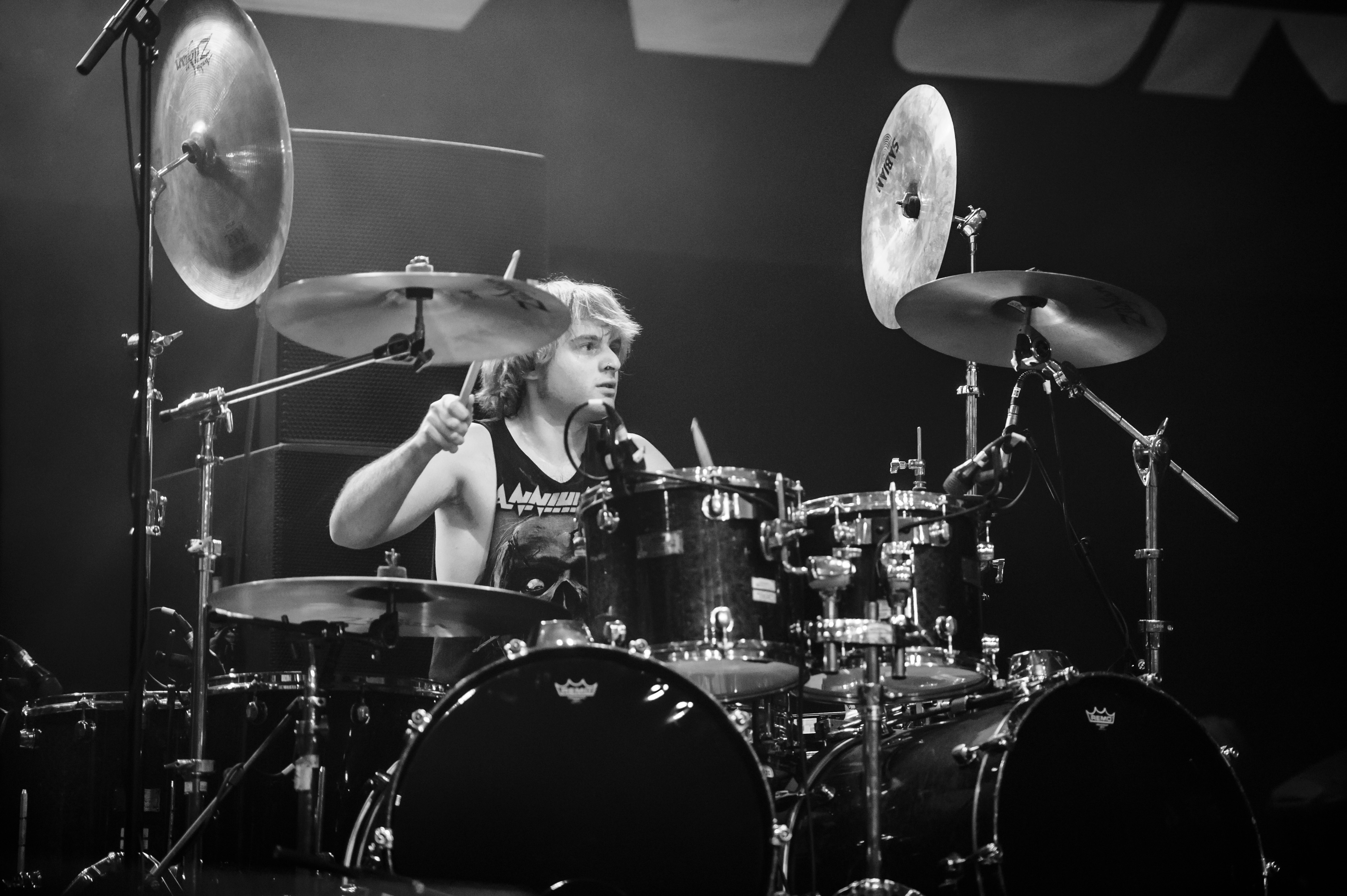 'Wacken Open Air 2017; Wacken': 'Annihilator'